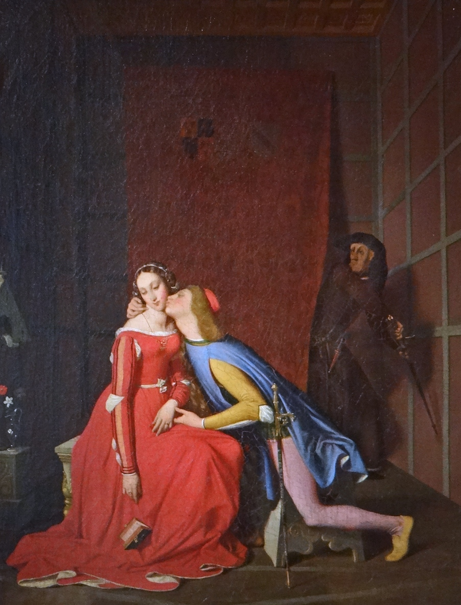 Paolo et Francesca Oeuvre de Jean-Auguste-Dominique Ingres (1780-1867) 1819 Huile sur toile Legs Turpin de Crissé, 1859 L'histoire tragique des amants Paolo et Francesca est tirée du chant V de la Divine Comédie de Dante Alighieri. Francesca a été mariée contre son gré à Gianciotto Malatesta, un guerrier difforme et boiteux qui la laisse le plus souvent seule mais à laquelle Paolo, son jeune frère, tient compagnie durant ses absences. Par malchance, l'époux apparaît, au fond de la pièce, très irrité et l'épée à la main, au moment où Paolo embrasse son épouse ! Francesca explique au poète que tout est arrivé en lisant un livre (qui tombe de sa main sur le tableau) qui expliquait l'amour entre Lancelot et Guenièvre, les deux trouvèrent «chaleur » dans le « baiser frémissant » qu'ils s'échangent à la fin et qui caractérise le début de leur passion. Musée des beaux-arts d'Angers Voir le Baiser de Rodin (photo dalbera) qui montre les deux mêmes amants enlacés. On les trouve également sur la Porte de l'Enfer.